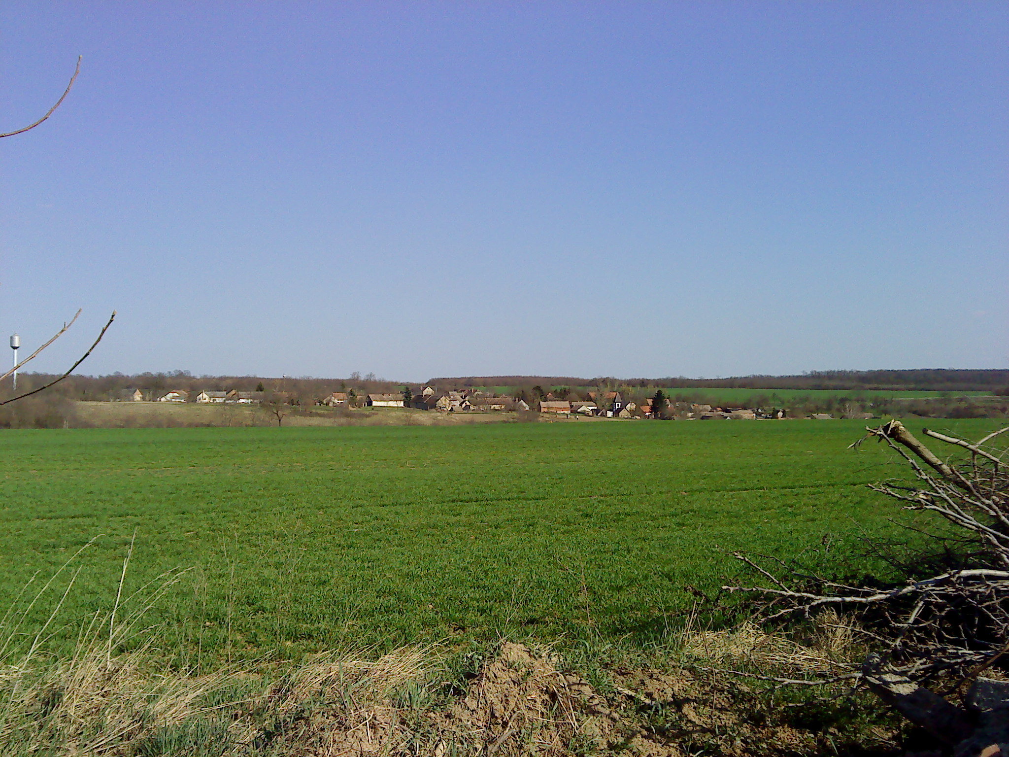 Bosta látképe nyugatról nézve